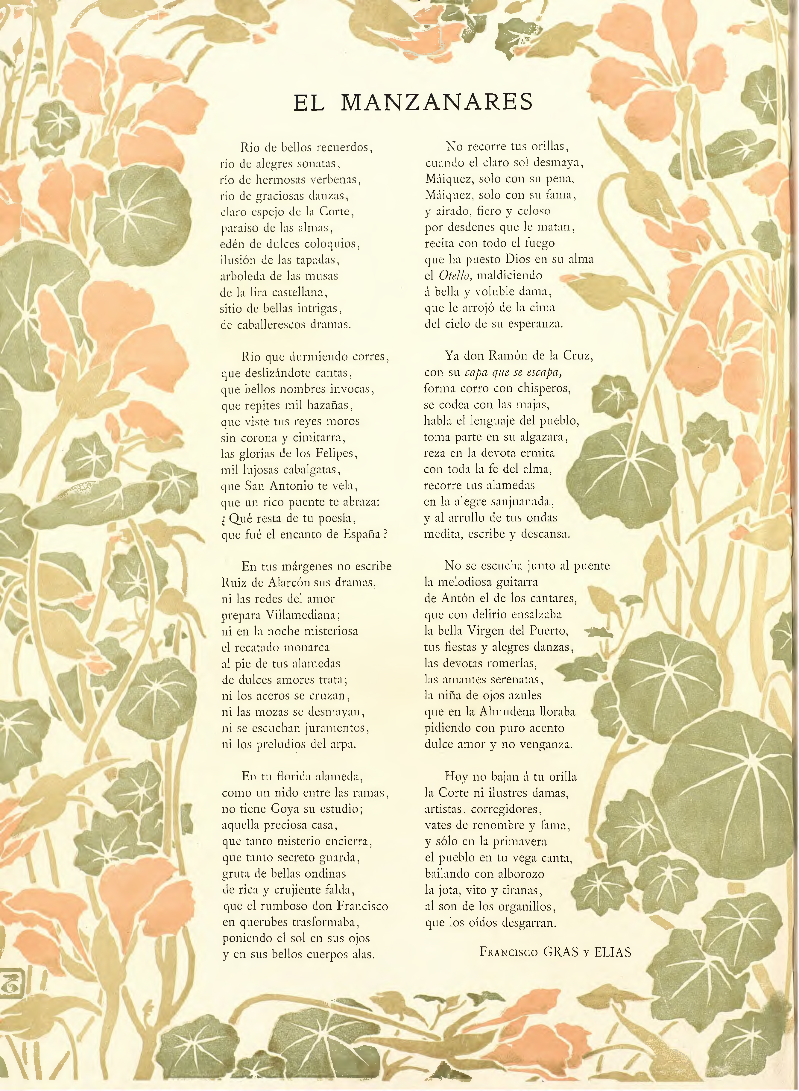 El Manzanares.